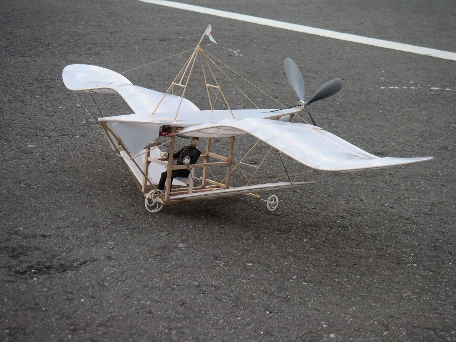 実際に飛行可能な玉虫型飛行器の復元RC模型です。